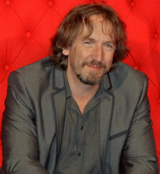 Yann Samuell au festival du film de Cabourg